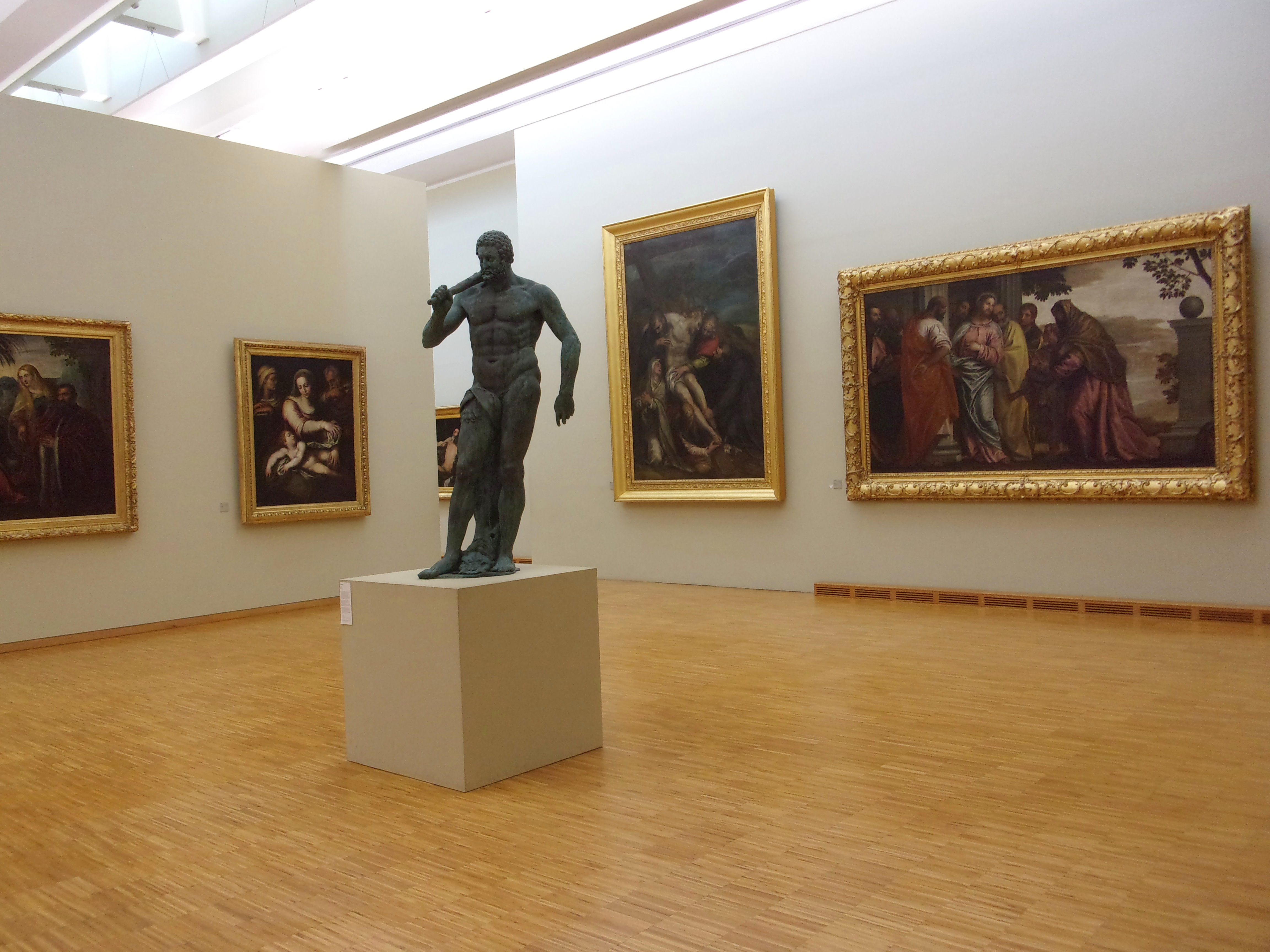 Salle N°1, période XIIIe au XVIe siècle, Musée de Grenoble